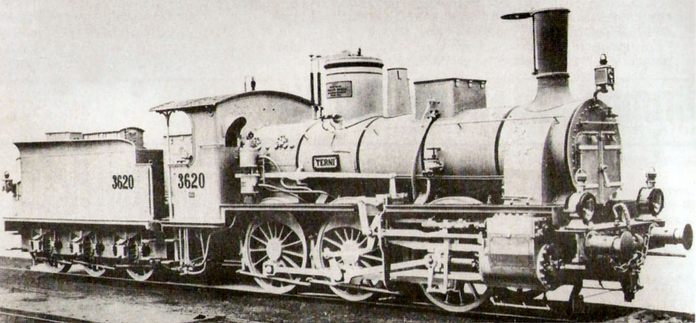 Locomotiva 3620 "Terni" della Rete Mediterranea, appartenente alla serie 3601–3700 (poi gruppo 320 delle FS)